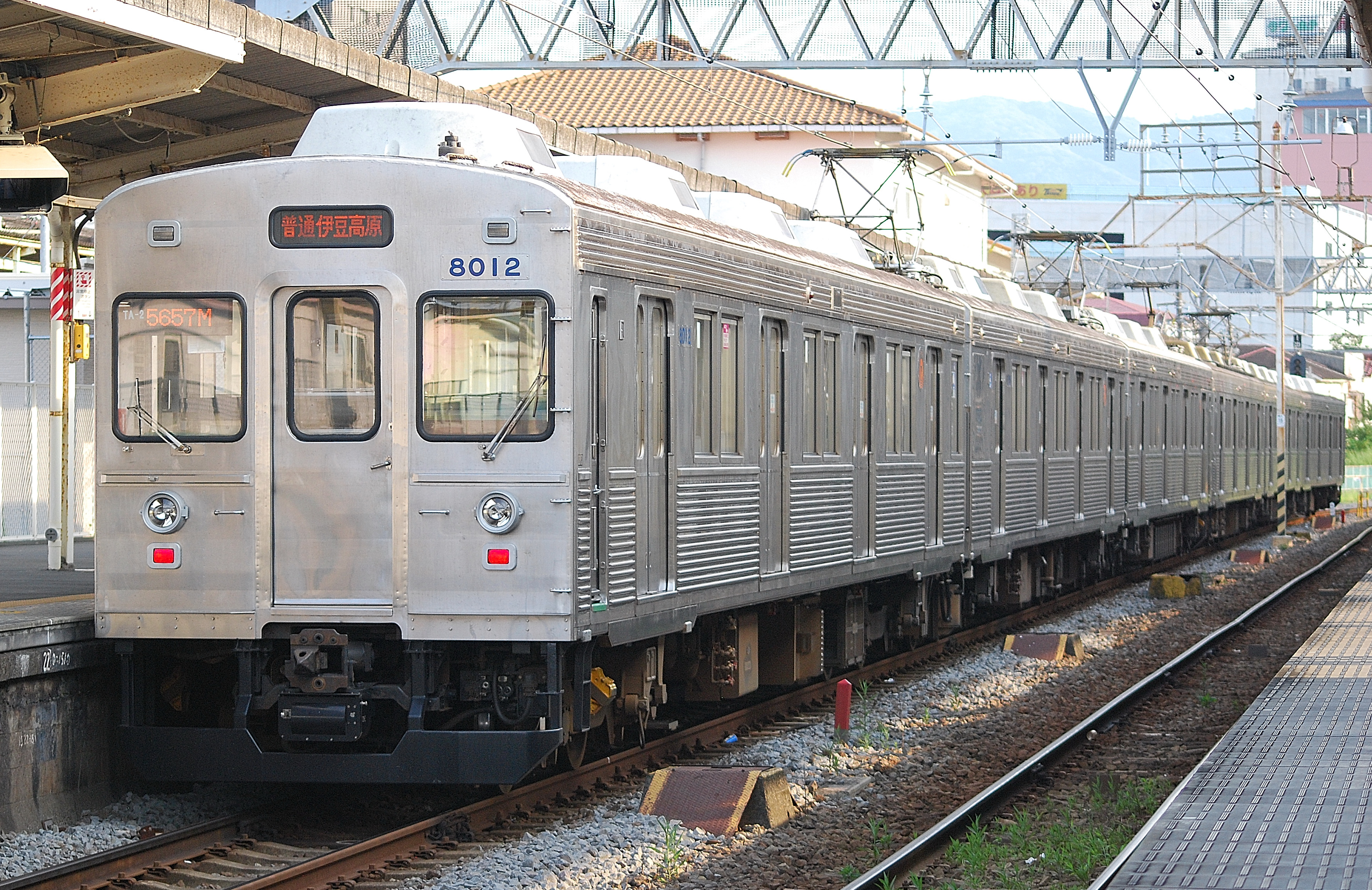 伊東駅で停車中の、東急8000系時代初期の状態に再現された、伊豆急8000系のTA-2＋TB-2編成。（ホームから撮影）